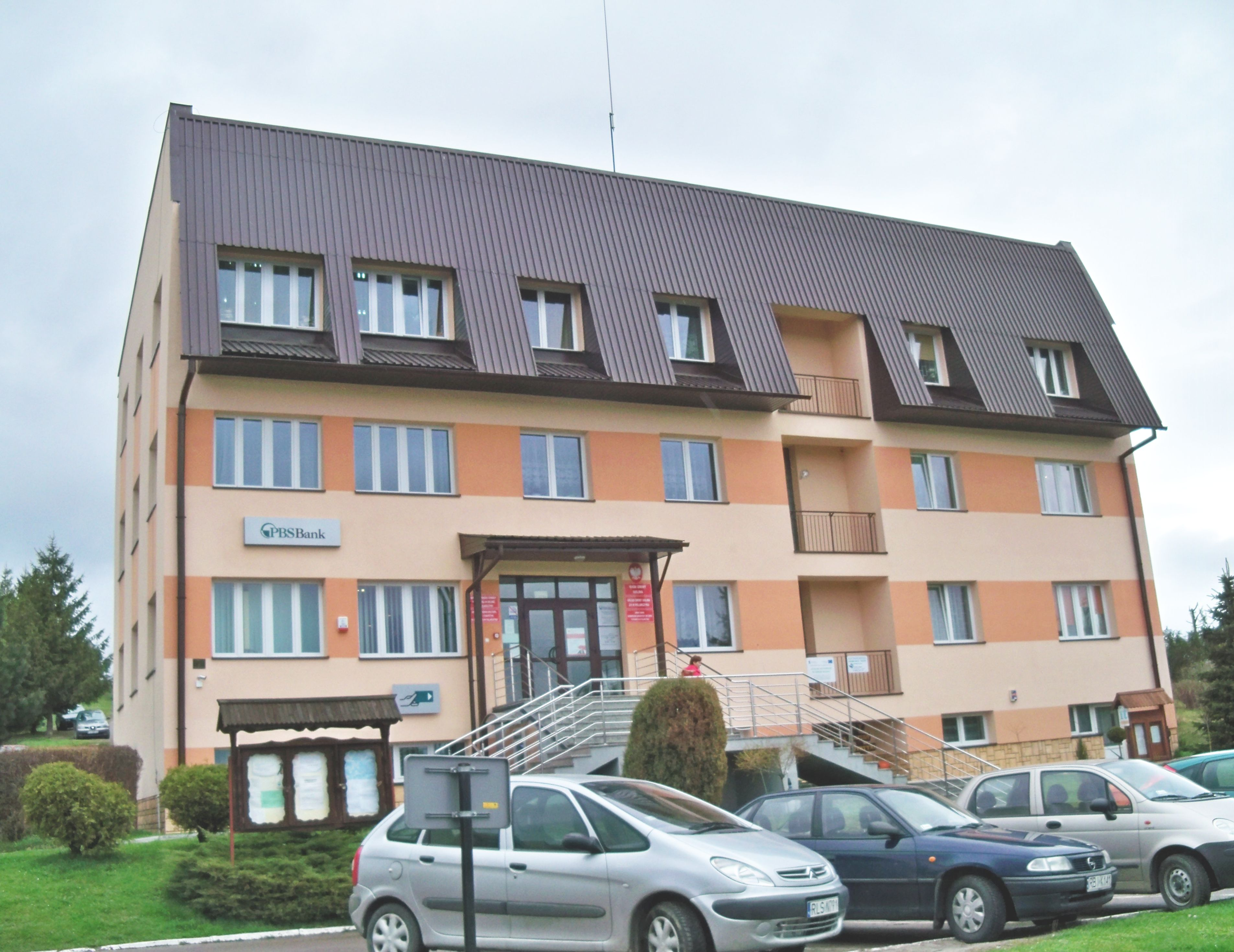 Polańczyk, siedziba Urzędu Gminy Solina